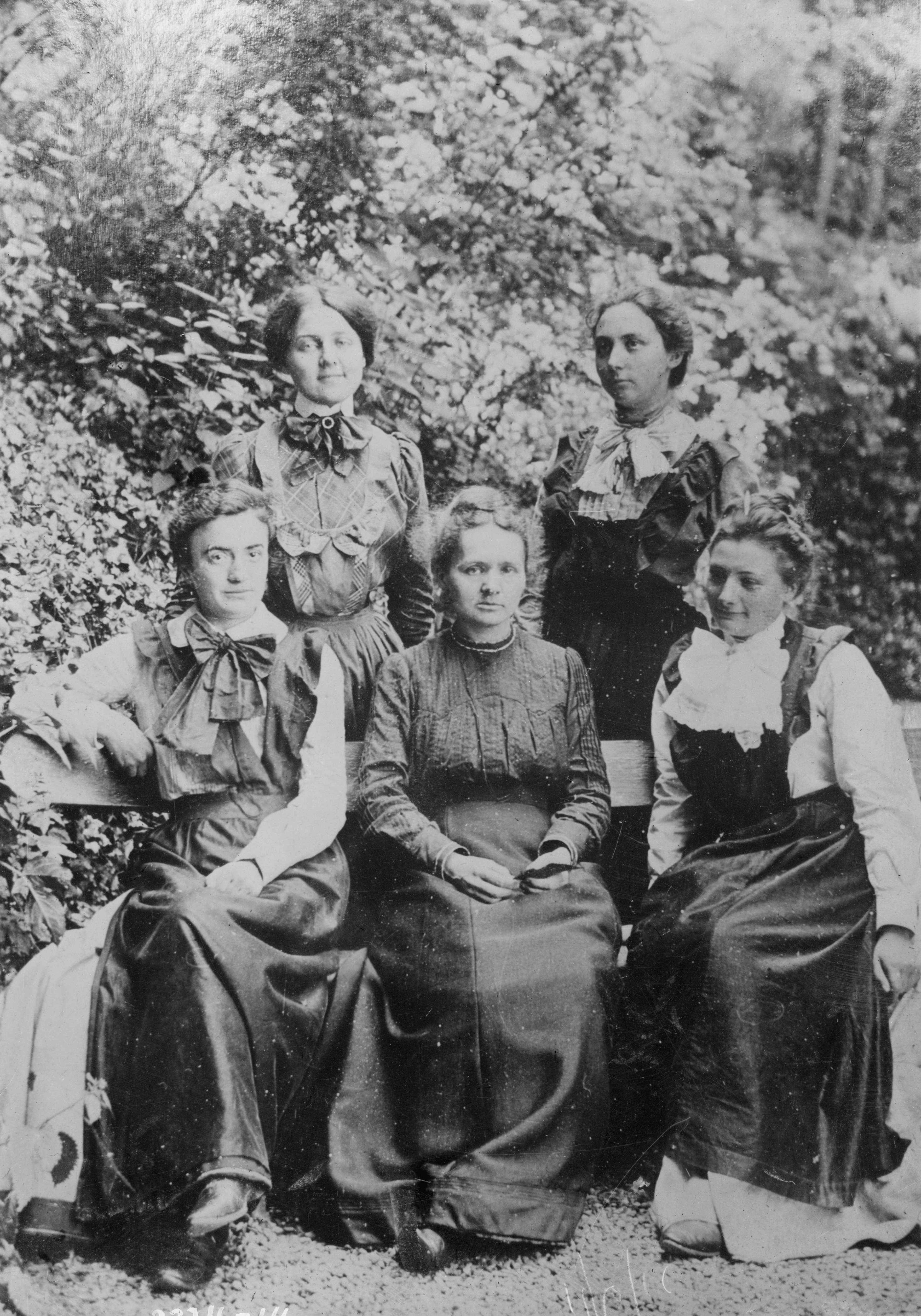 Mme. Curie and 4 students